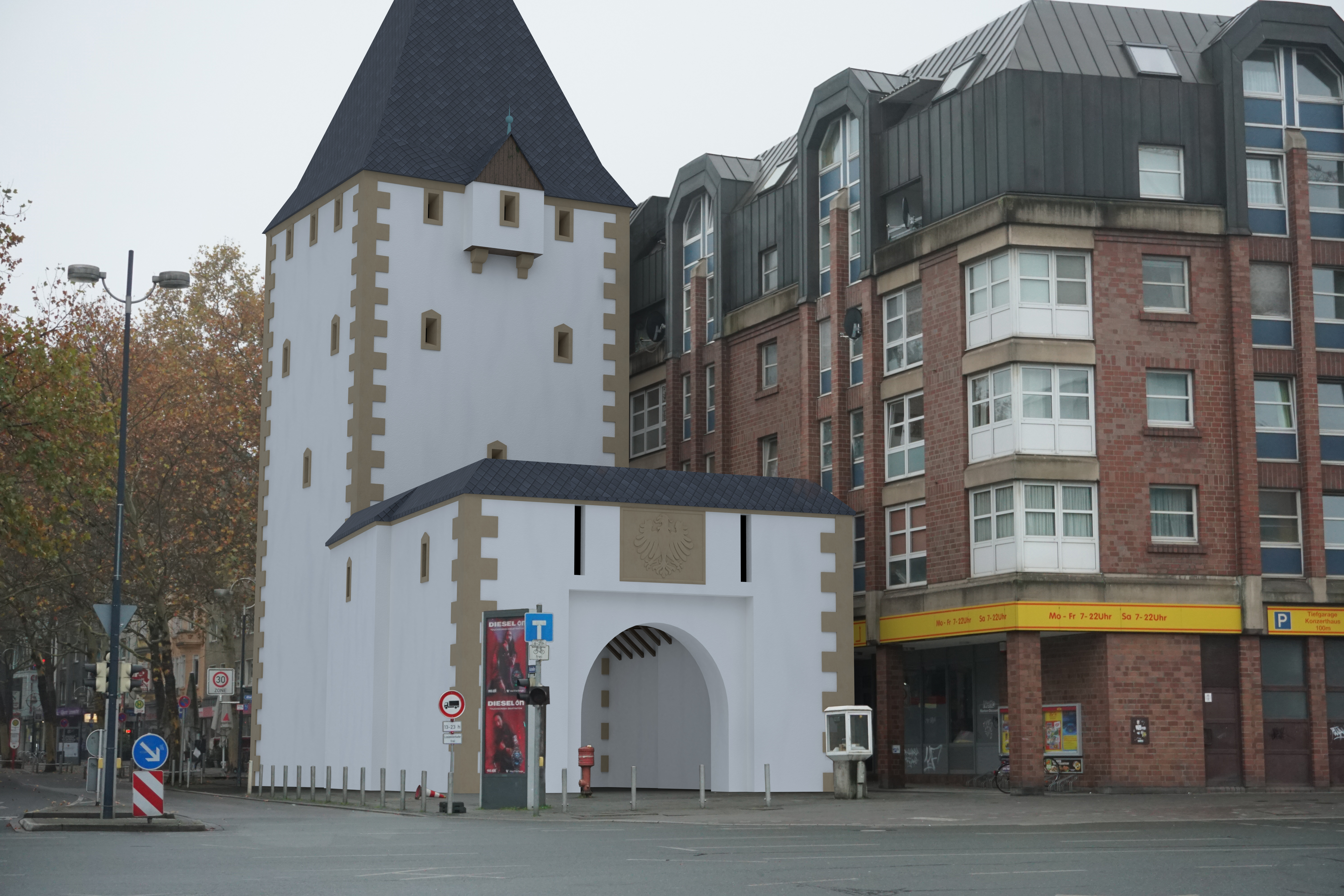 Fotomontage des historischen Kuckelketors in ein Foto aus dem Jahre 2018. Gut zu erkennen ist, dass das Tor nicht mittig auf der heutigen Straße stand, auch befand es sich nicht auf der heutigen Kreuzung mit dem Wall. Die Straßenverläufe wurden nach dem zweiten Weltkrieg geändert. Das Fundament des Tores wurde archäologisch ergraben und ist heute im Pflaster nachgezeichnet.